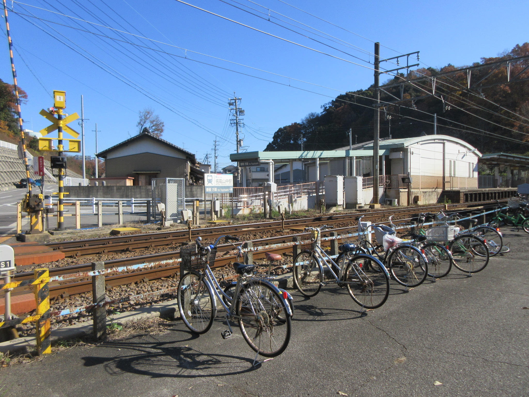 名電山中駅（岡崎市舞木町）